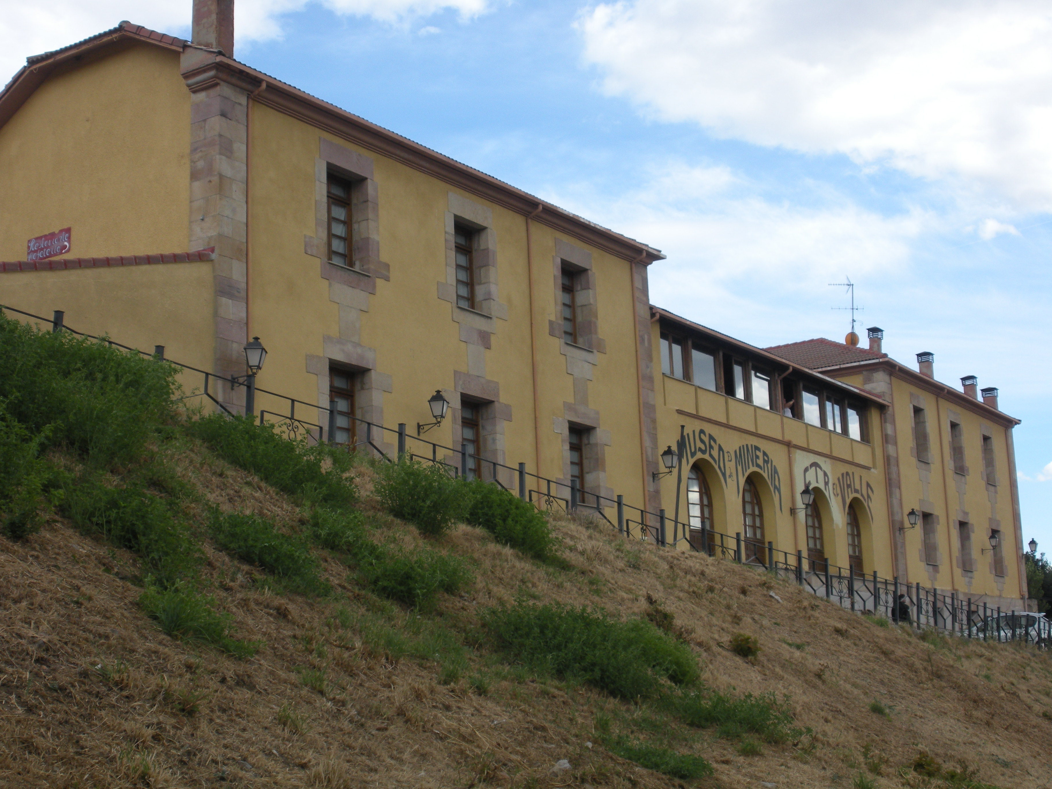 Vista exterior del museo minero, perteneciente al Centro de Interpretación de la Minería en Barruelo de Santullán, Palencia (España)